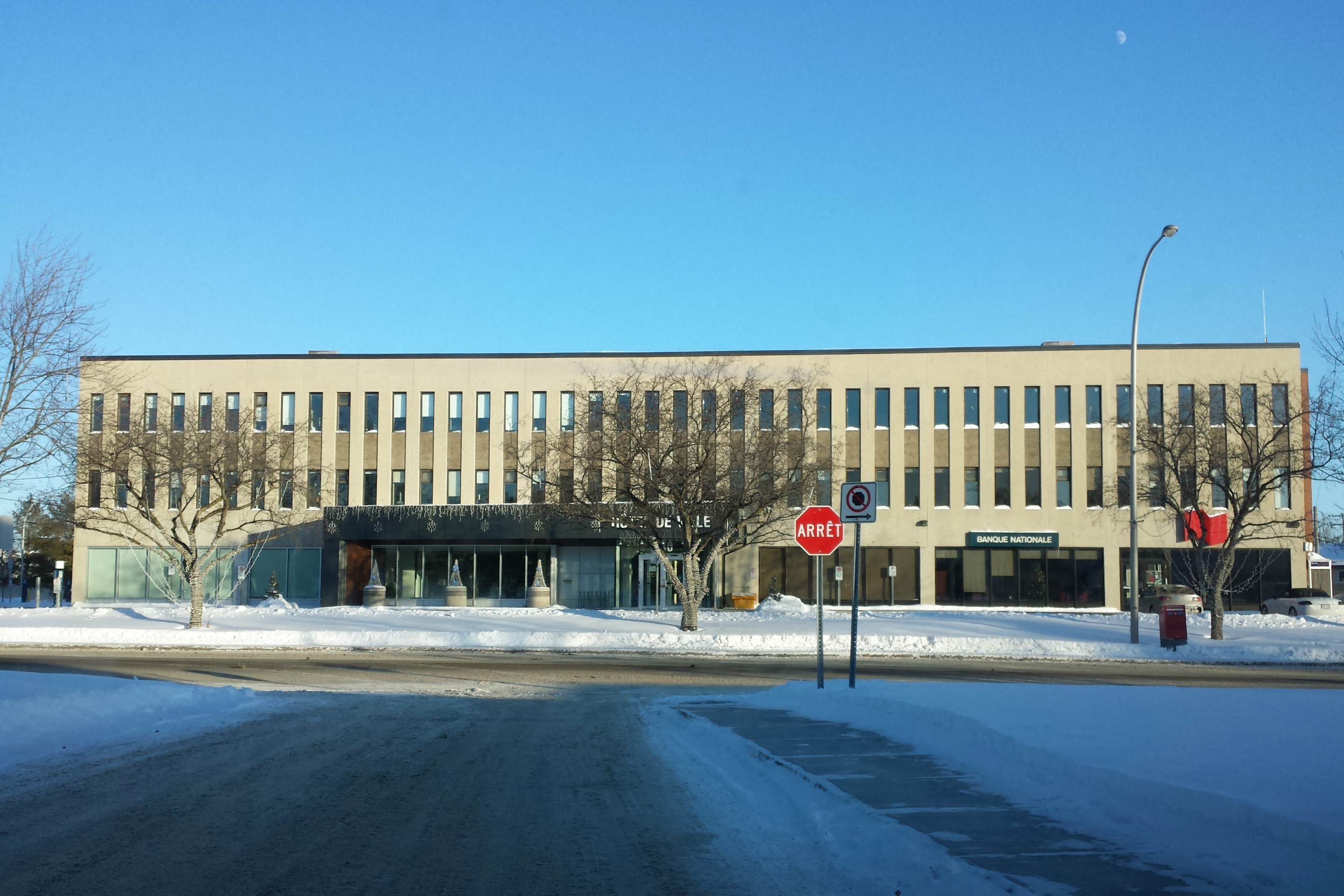 Boisbriand, Quebec, Canada